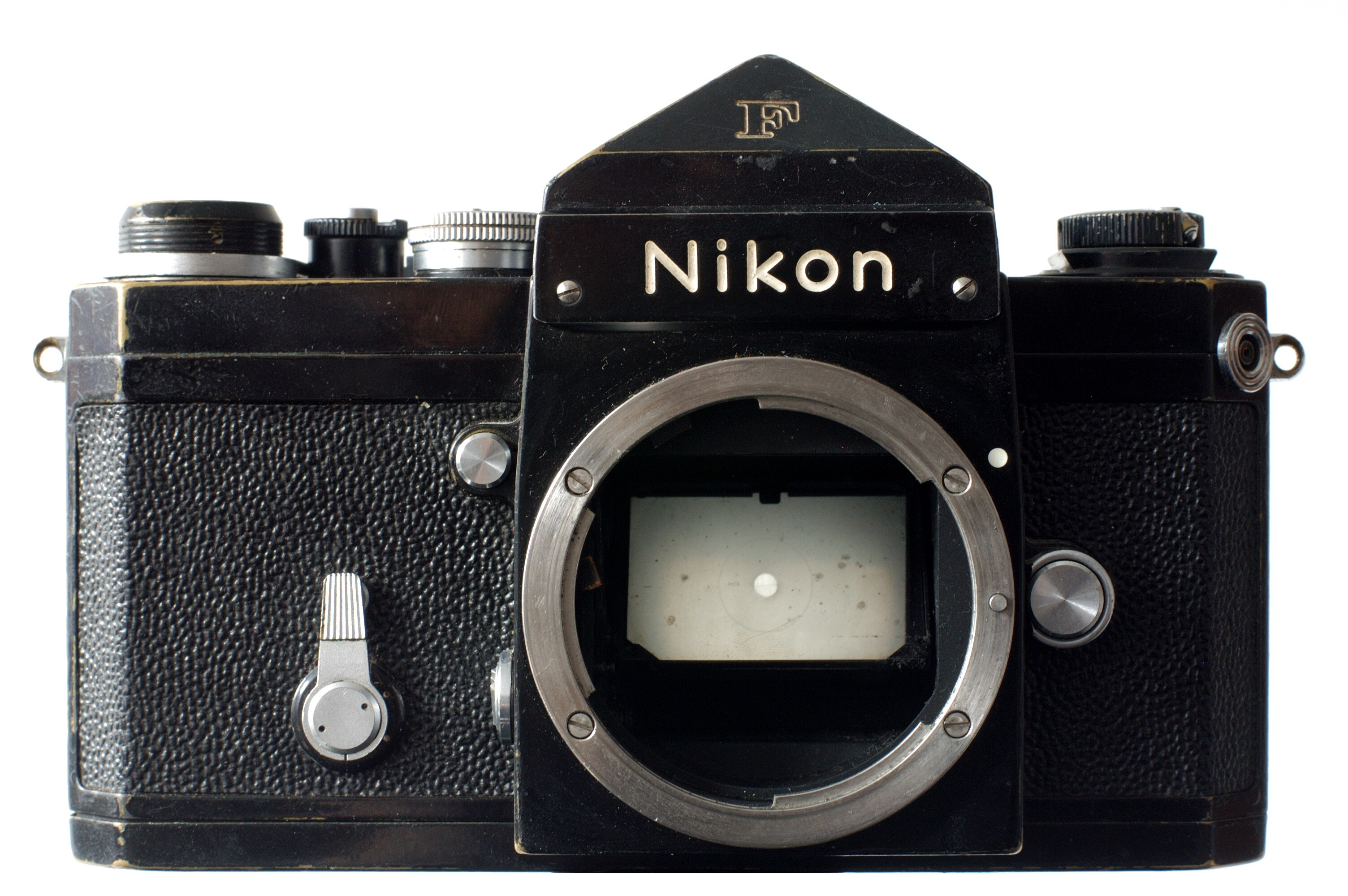 Nikon F black, # 6937665